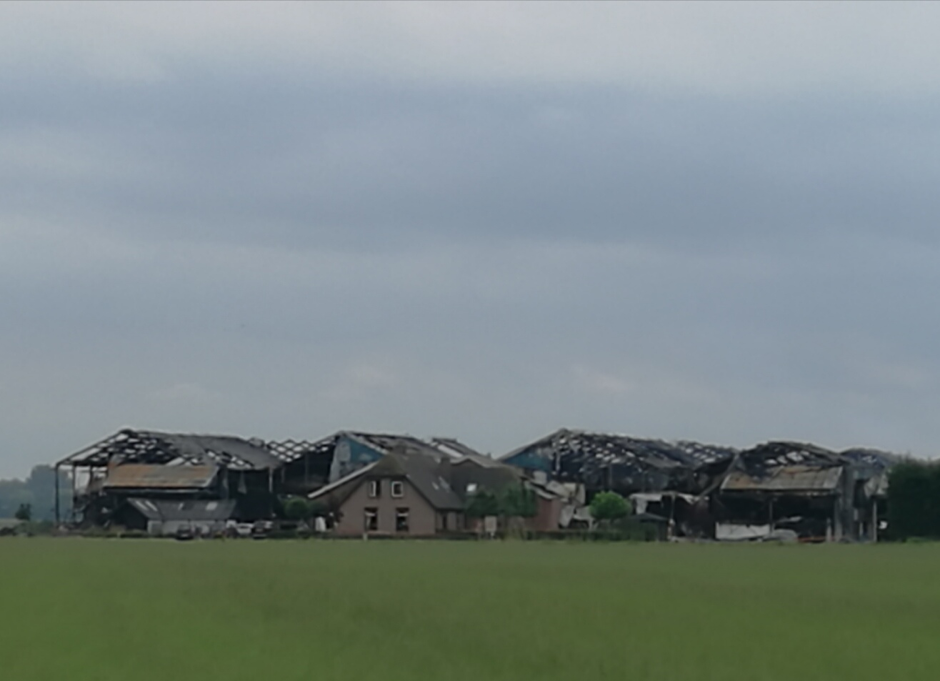 Op 29 juli 2017 hielden dierenliefhebbers en -activisten van verschillende groepen een wake voor de circa 20.000 varkens die twee dagen eerder waren omgekomen bij de stalbrand op boerderij De Knorhof in Erichem. Zij herdachten de dieren en protesteerden tegen dierenleed.